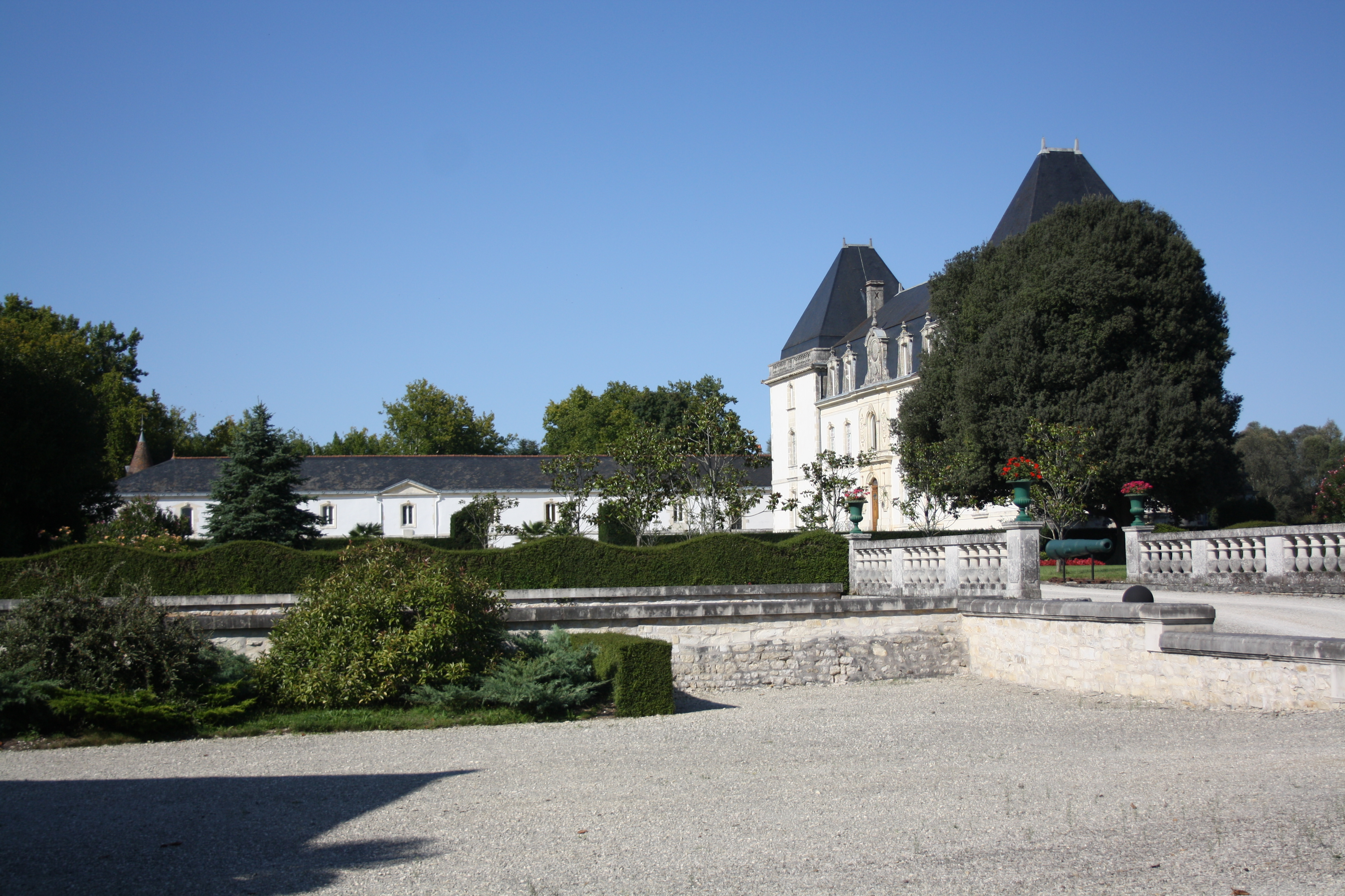 Chateau de Vervant, Charente-Maritime (France).